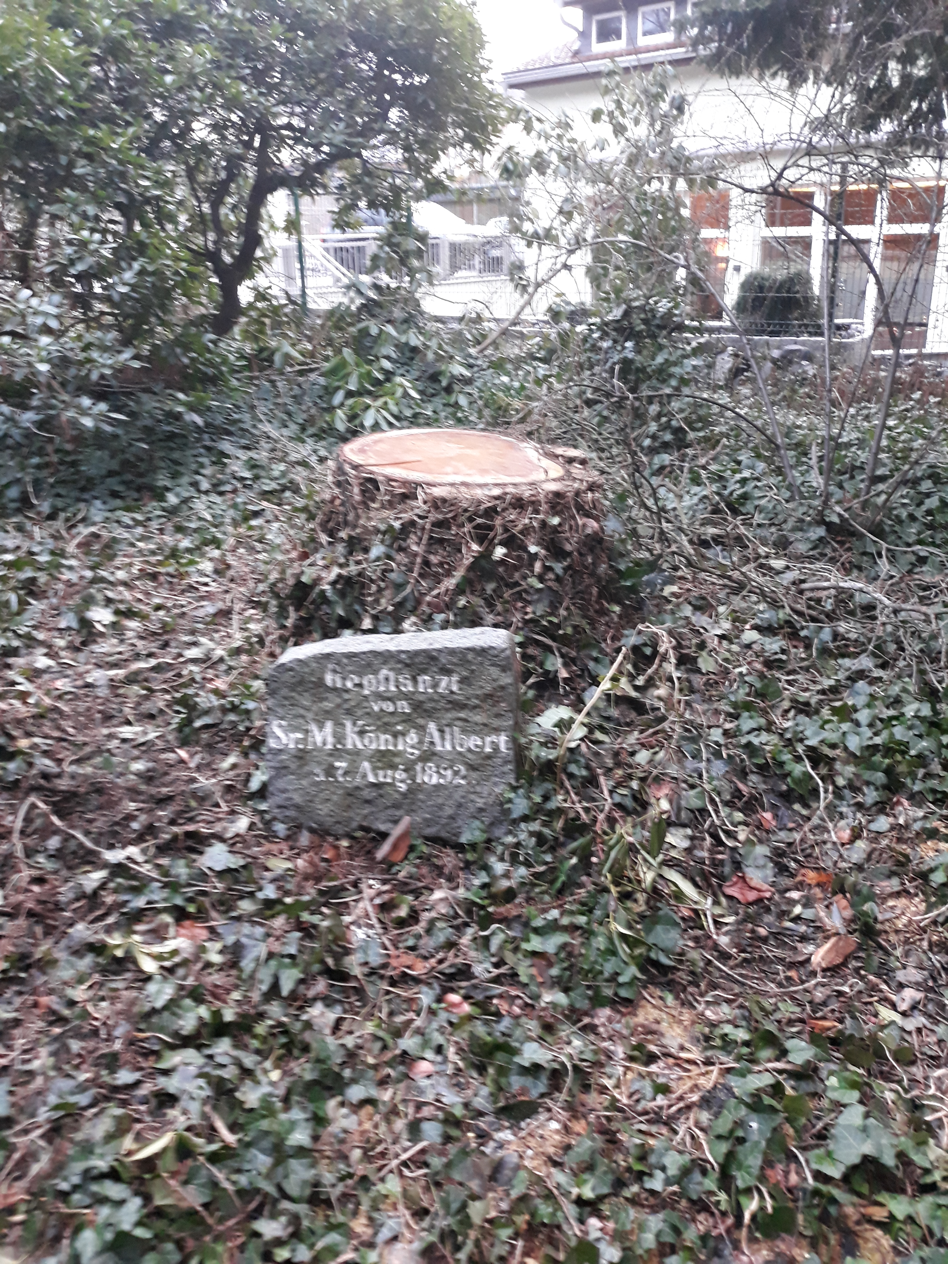 Gedenkstein für einen 1892 durch den sächsichen König Alber gepflanzten Baum im heutigen Volkspark Kamenz (Sachsen).